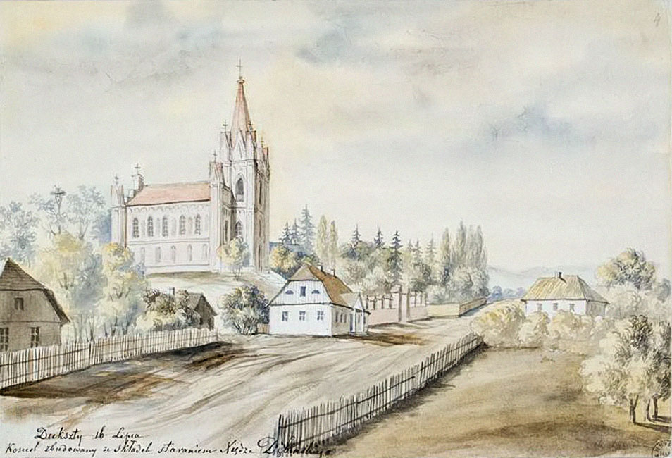 Беларуская (тарашкевіца): Дукшты